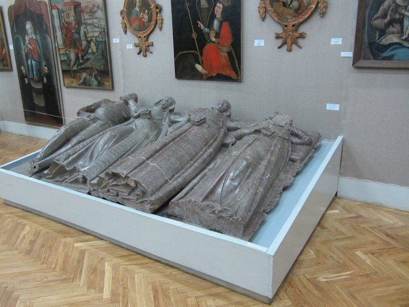 Надмагілле Сапегаў. Экспазіцыя Музея старажытнабеларускай культуры